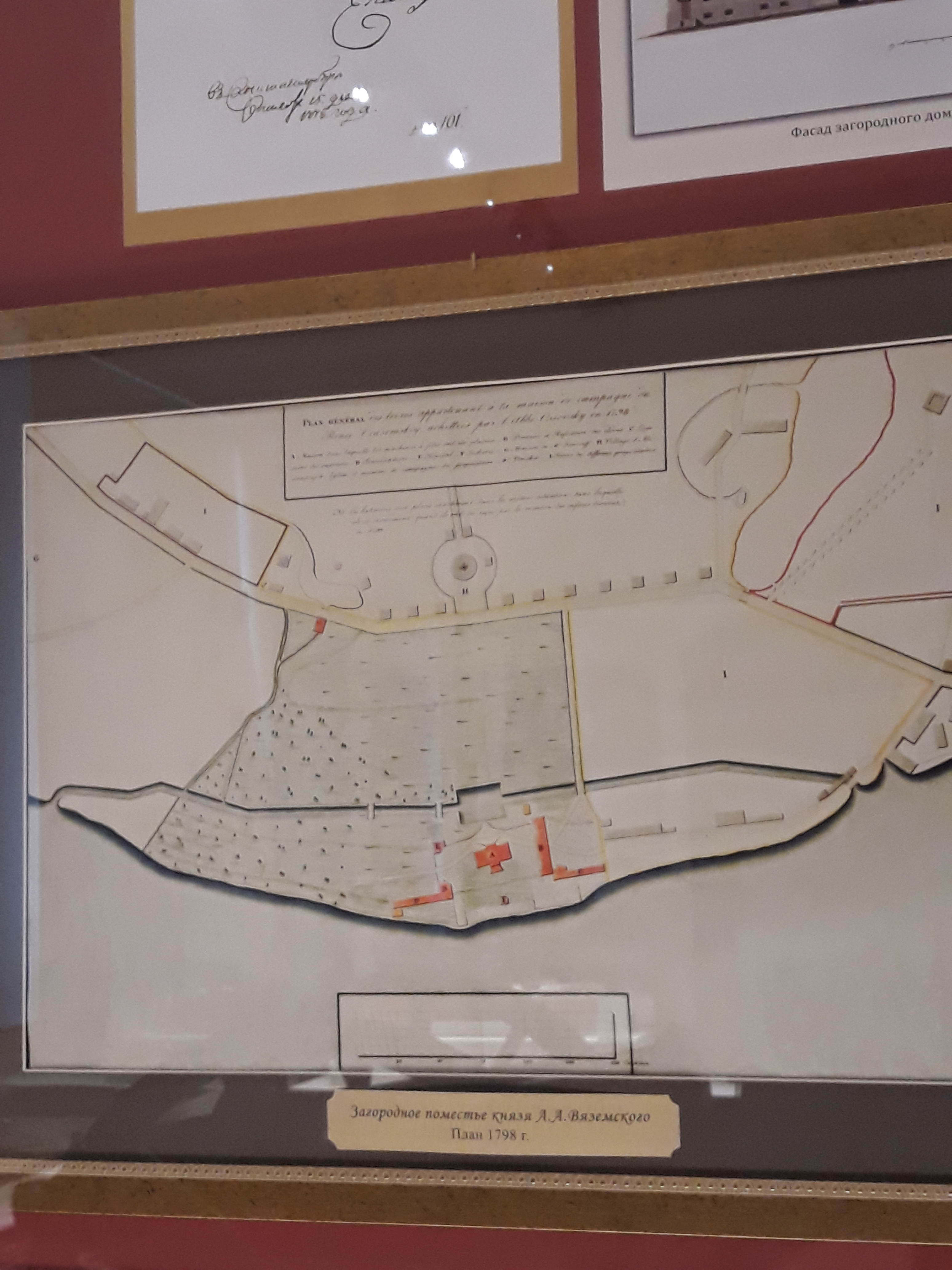 Экспонат музея Обуховского завода. План загородного поместья кн.Вяземского. 1798 года. В дальнейшем на этих землях расположился Обуховский завод